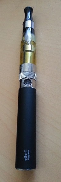 Cigarette électronique montée avec un cartomiseur.